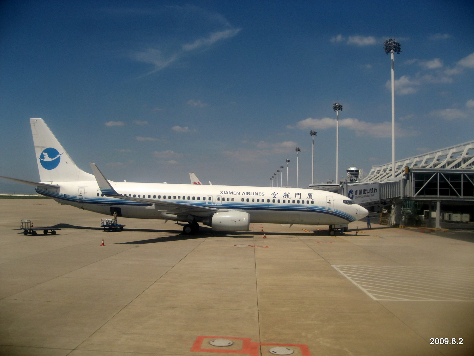 厦门高崎机场